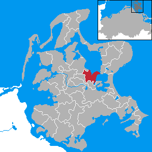 Ralswiek, Landkreis Rügen, Mecklenburg-Vorpommern